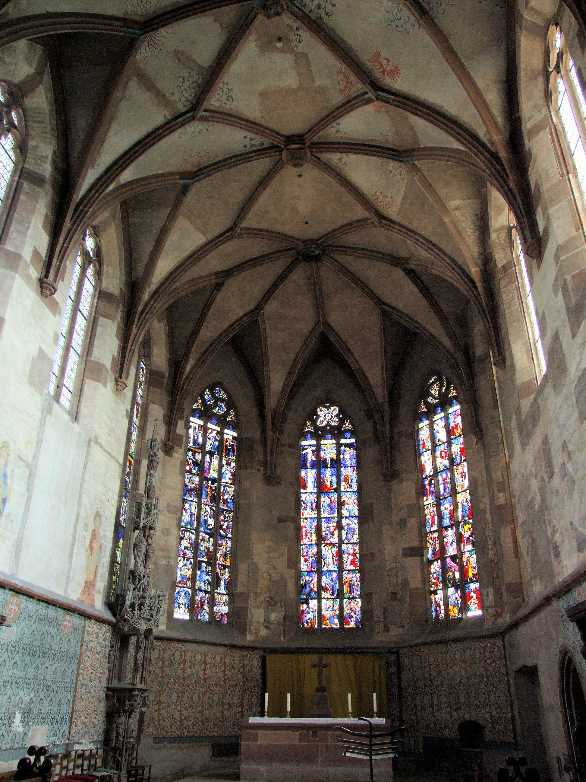 Walbourg - Eglise Sainte-Walburge - Chœur